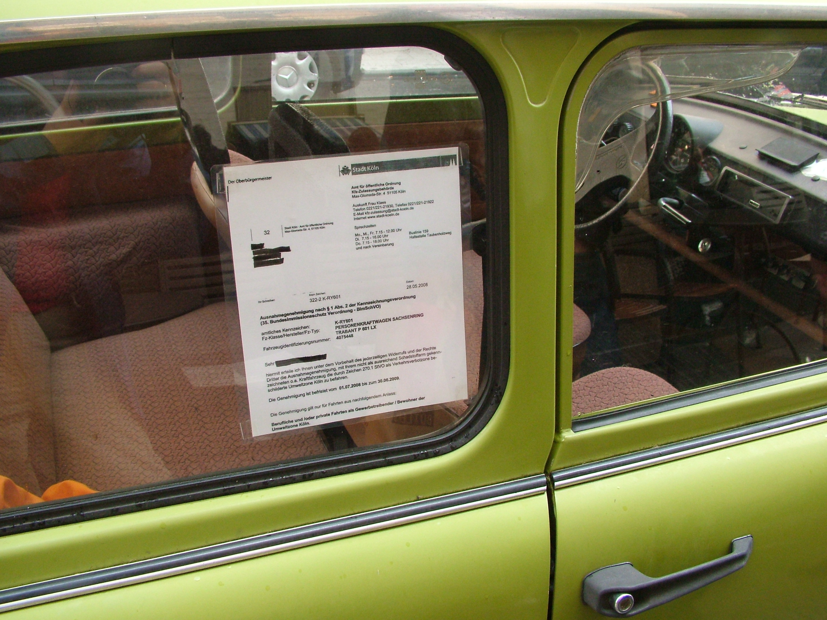 Trabant in Köln. Der Besitzer hat ein anonymisiertes Schreiben an die Scheibe geklebt, um darauf hinzuweisen, dass die Stadt ihm eine Ausnahmegenehmigung in Bezug auf die Umweltzone erteilt hat.